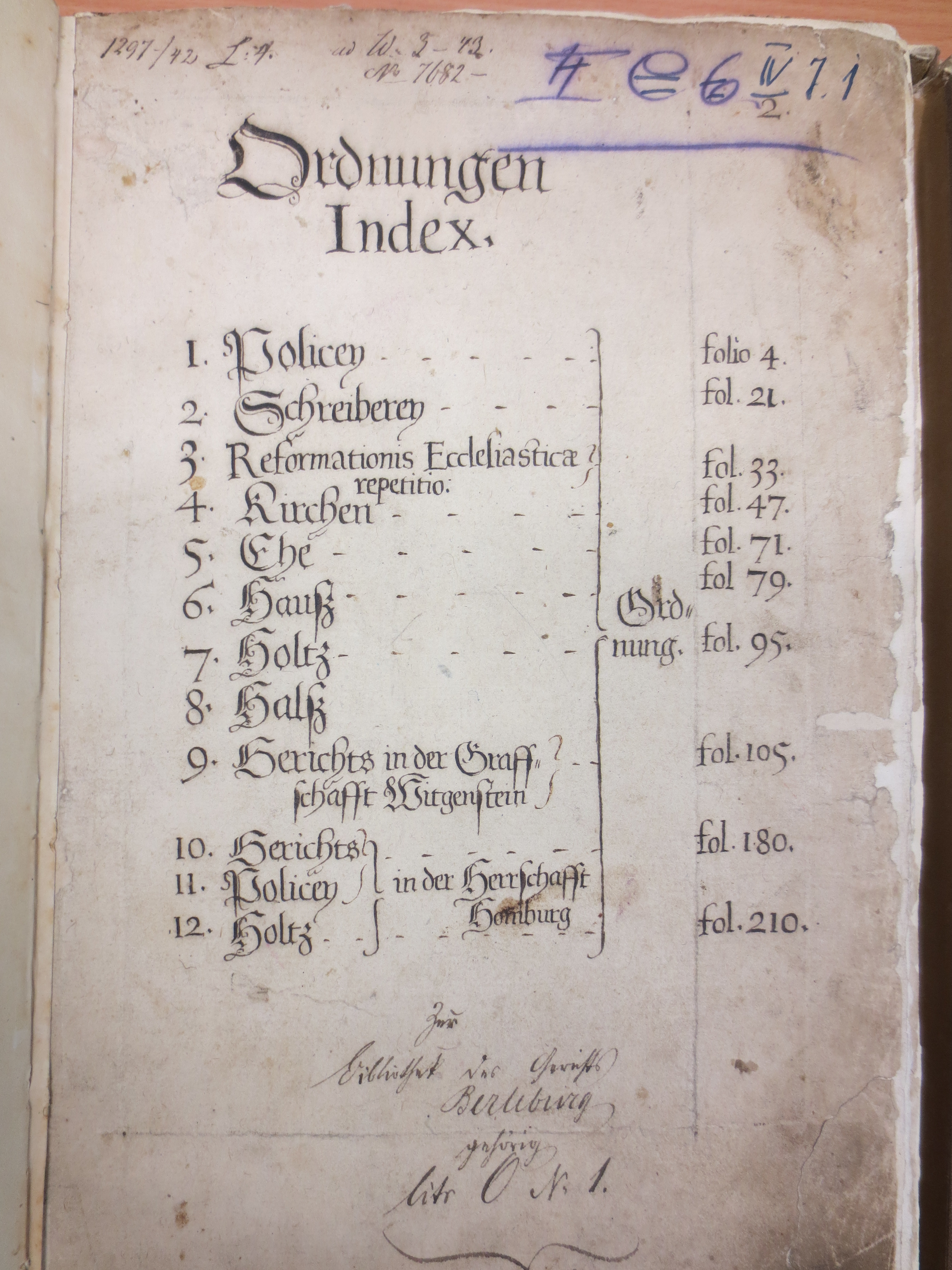 Inhaltsverzeichnis des Wittgensteiner Landrechts: Ordnungen-Index